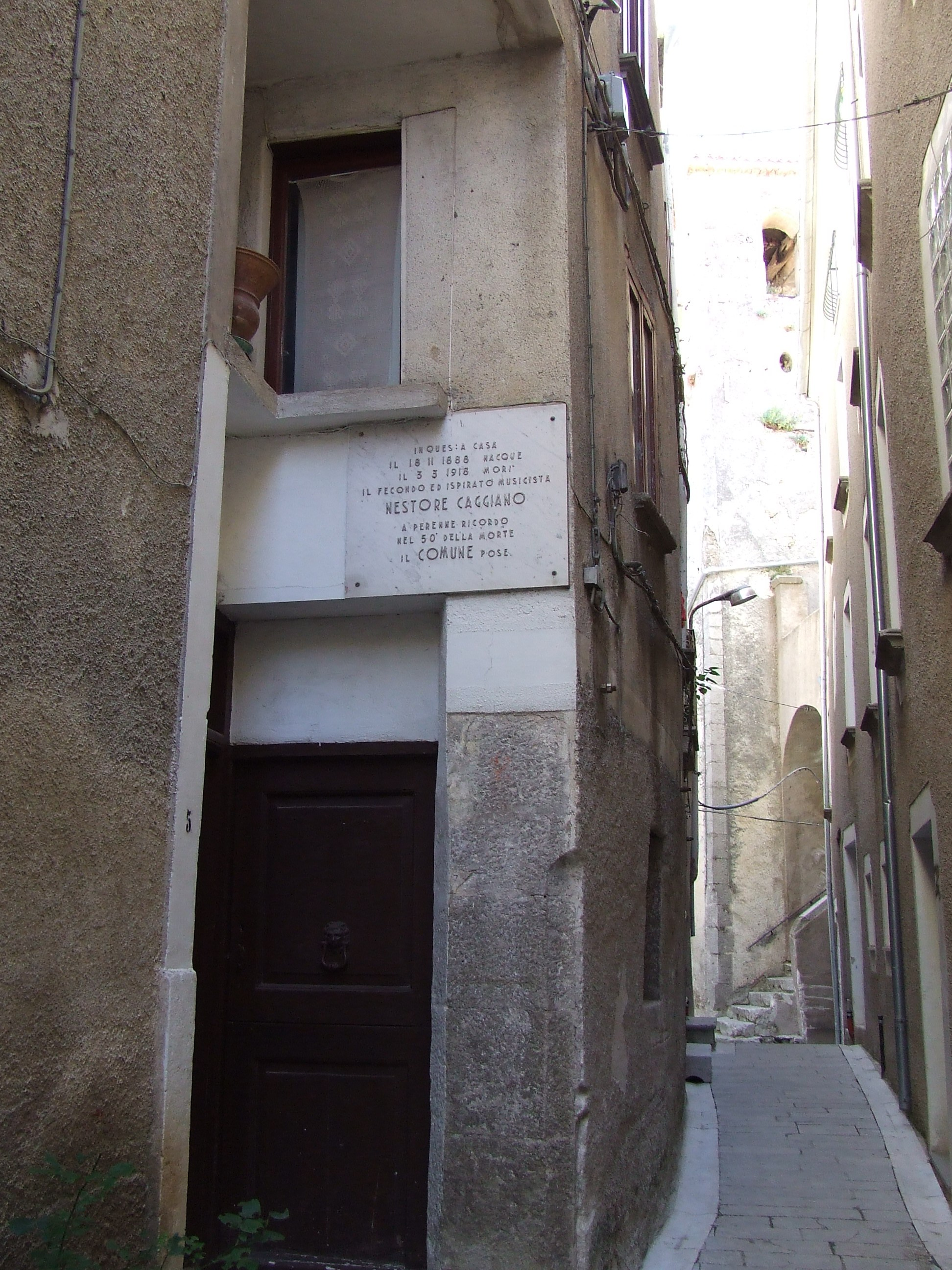 Casa dove visse il compositore Nestore Caggiano in Caggiano.